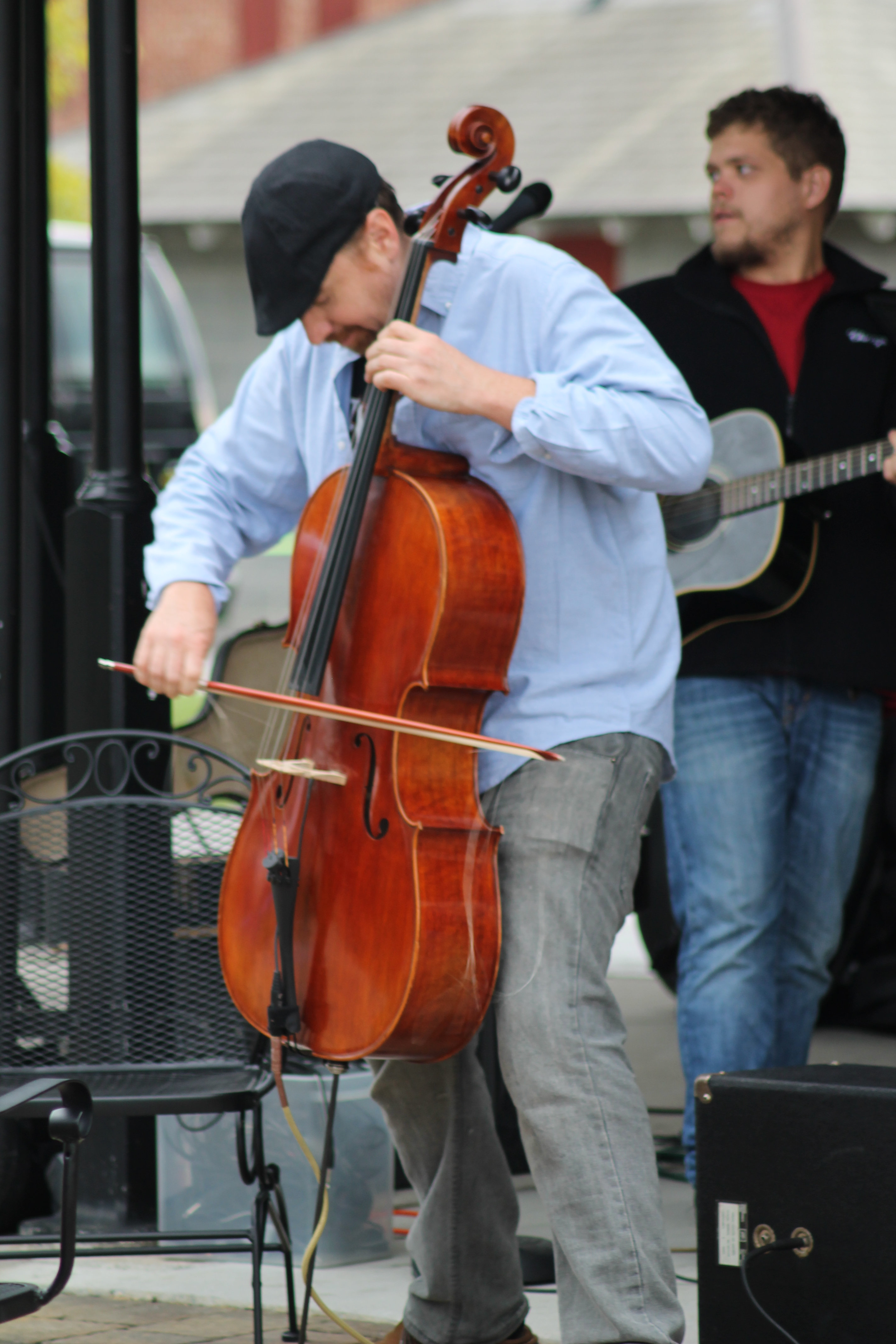 Pre-Race Event